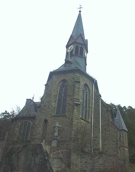 Kirche in Schmitten